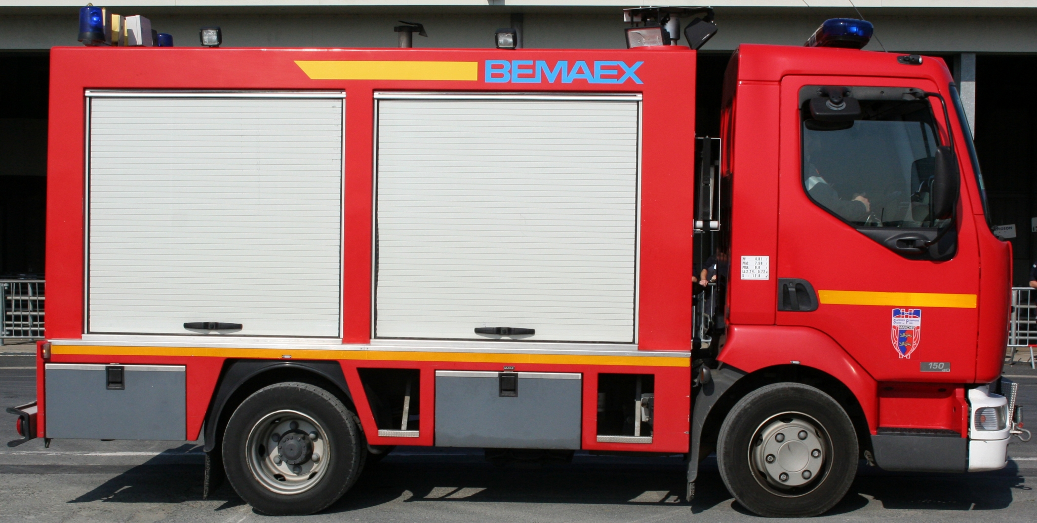 VSR des pompiers en France